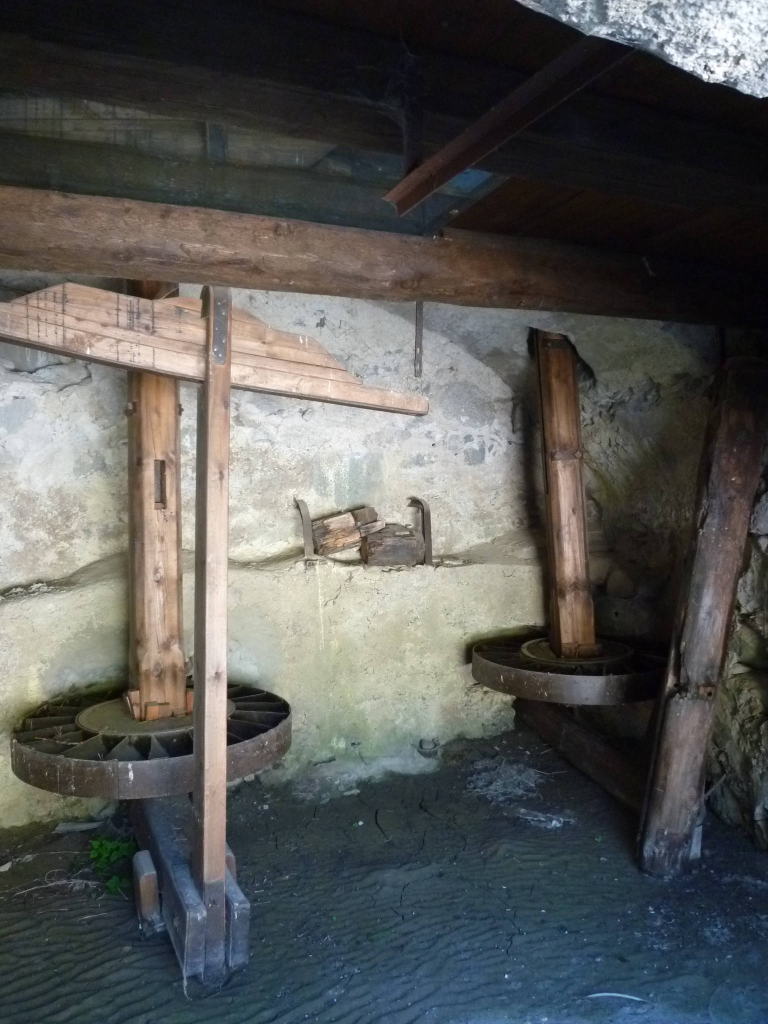 Era Mòla dera Vila de Salardú (Naut Aran}: rodes amb paletes horitzontals